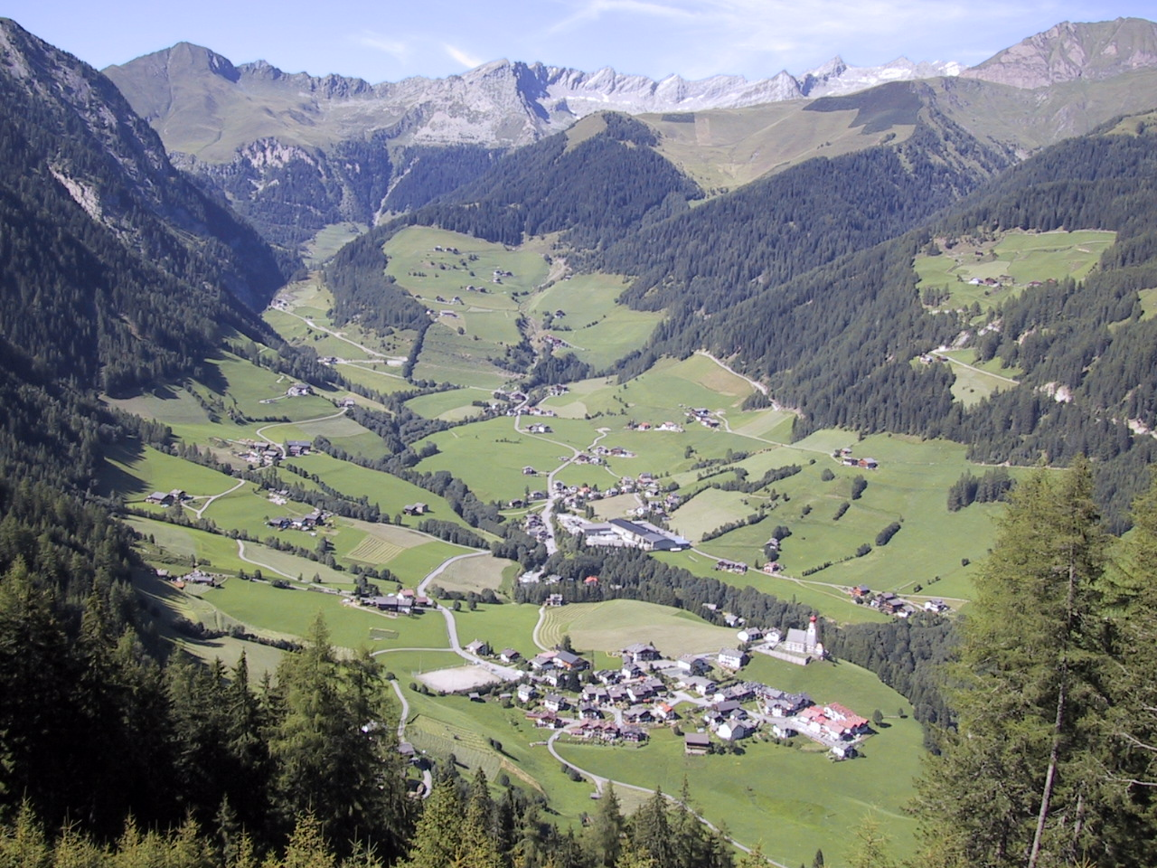 Der Talkessel von Pfunders mit den Ortsteilen Schattseite links, Sonnseite mit Riegl rechts, Eggerseite